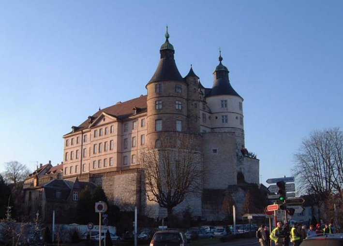 Je suis l'auteur de cette photo prise le 19-12-2006